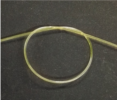 Plastikozko zuntz optiko baten argazkia mikroskopio bat erabilita. PZO bat ile baten lodiera dauka.